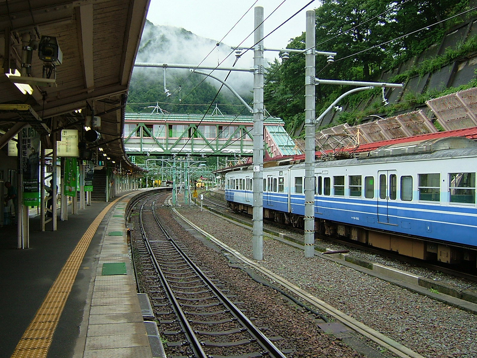 上越線水上駅プラットホーム（１番線から見た越後湯沢方面）